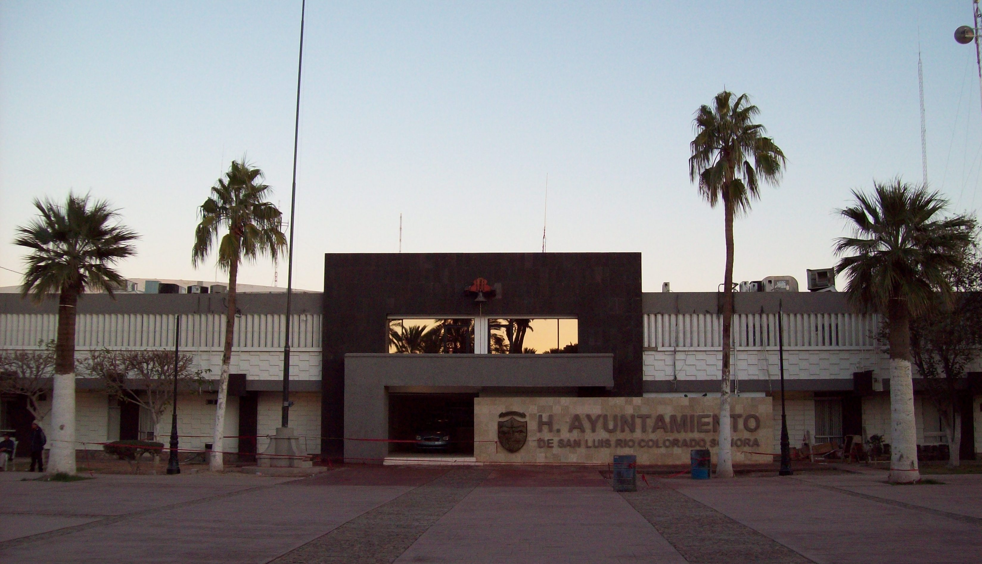 palacio municipal S. L. R. C.